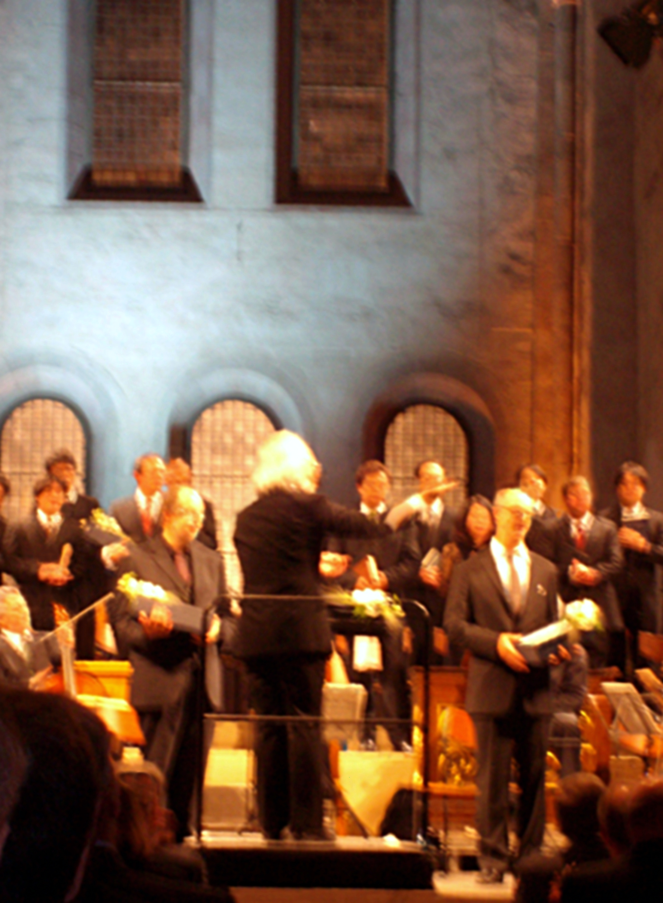 Masaaki Suzuki am 24. August 2011 in Kloster Eberbach (J.S. Bach: Matthäuspassion) mit Peter Kooij und Gerd Türk